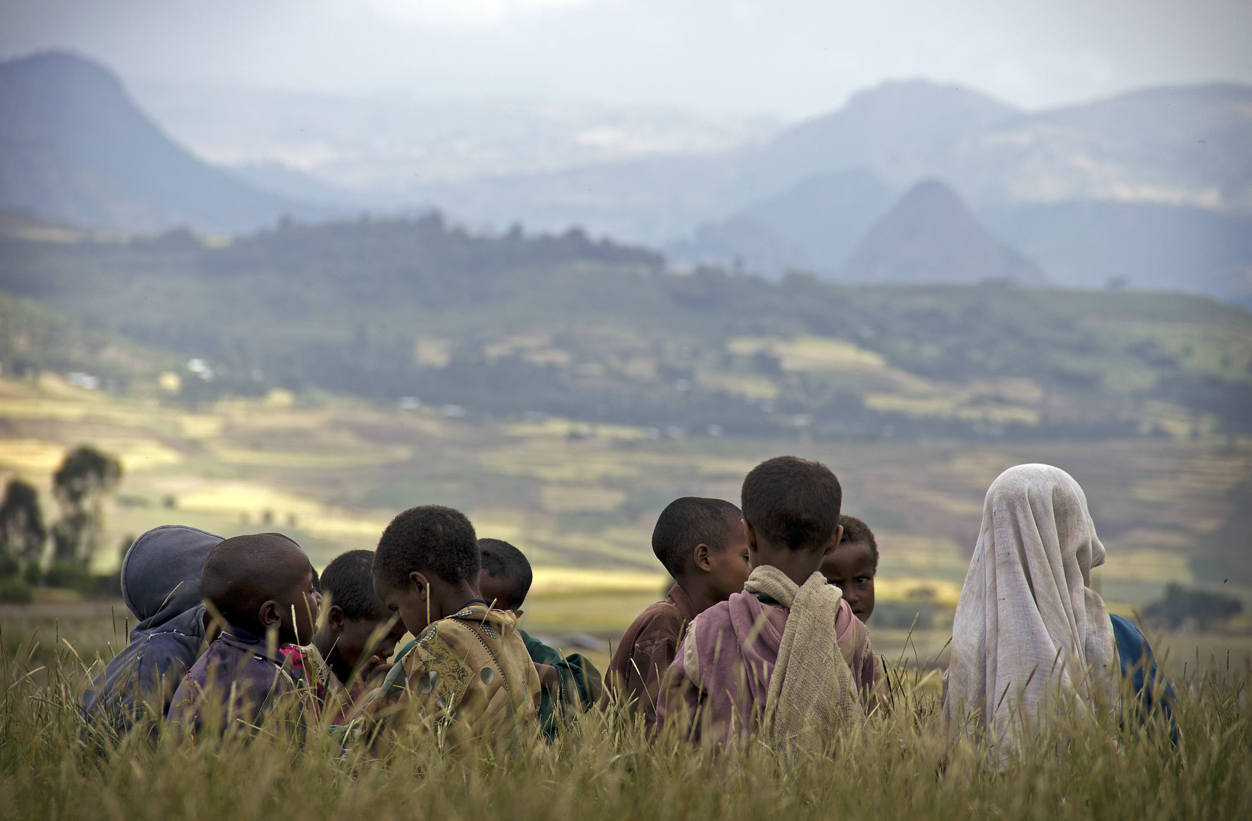 Ethiopian Class